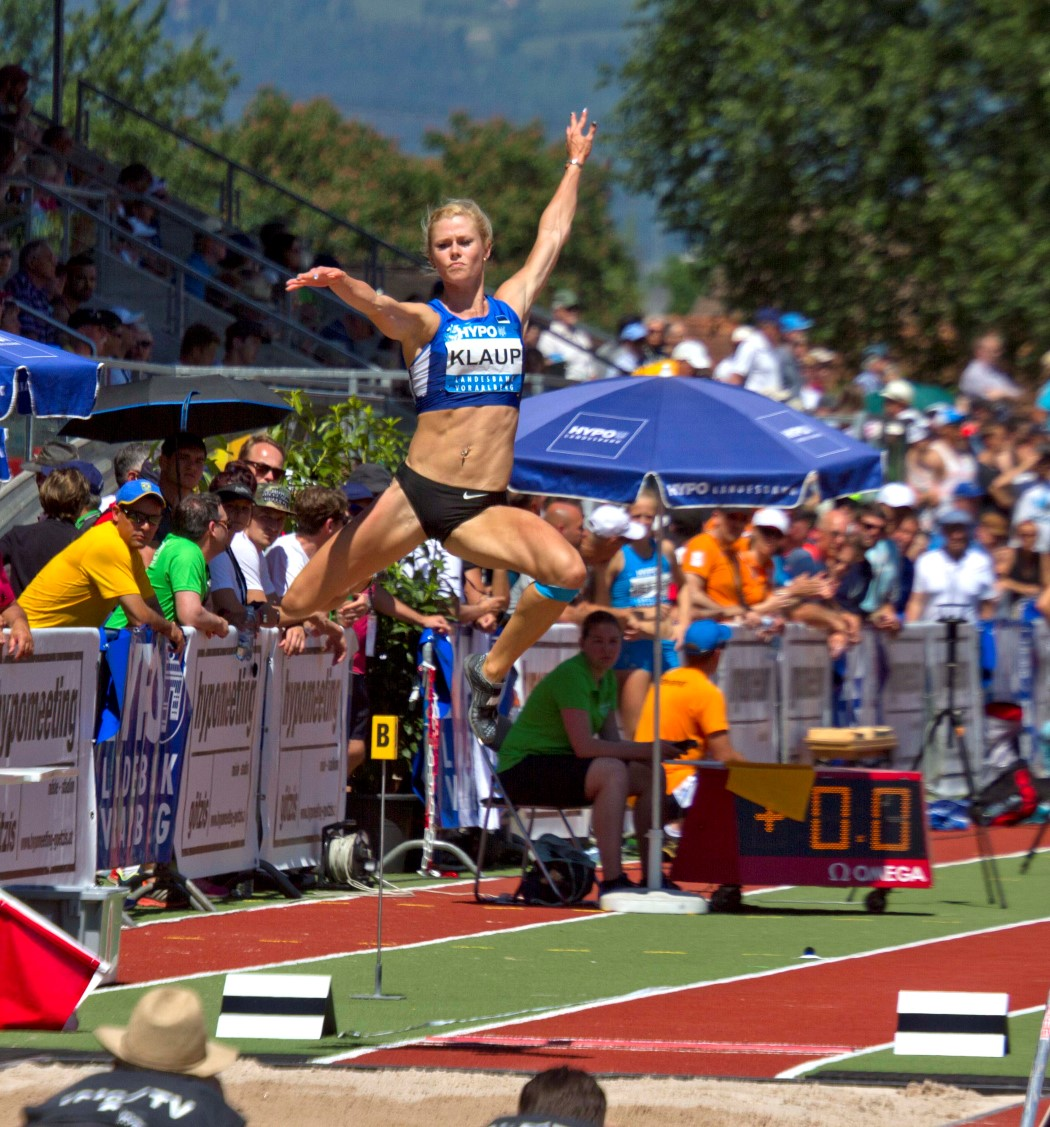 309 klaup ver